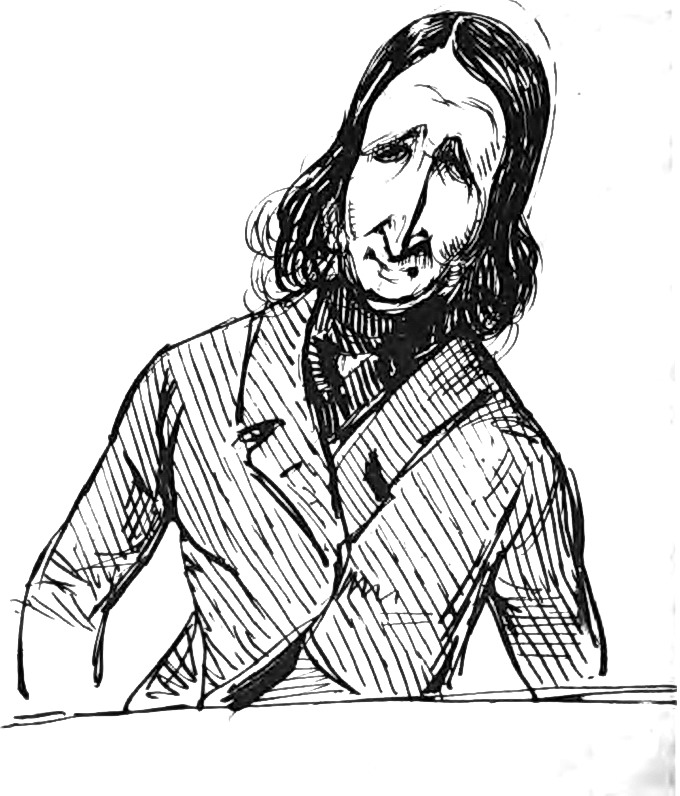 Alfred_de_Vigny,_dessin_de_Mérimée